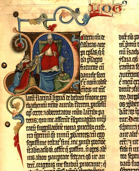 Nekcsei Biblia, Szent Jeromos